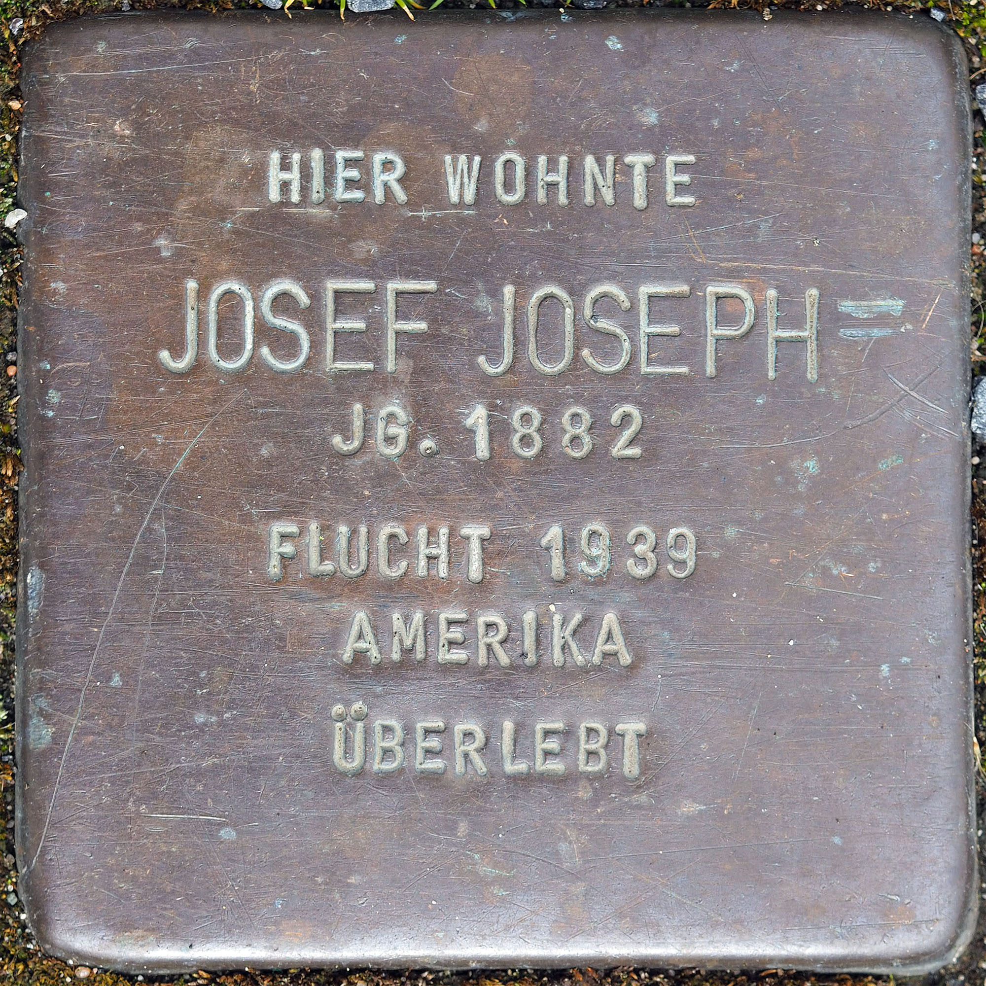 Stolpersteine MG: Joseph, Josef